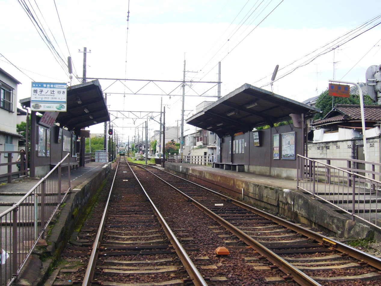 京都市北区にある京福電気鉄道北野線等持院駅。向こうには隣の龍安寺駅を発車した直後の北野白梅町駅行き電車が見える。2007年9月10日に投稿者が撮影。